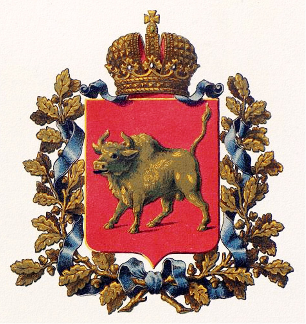 Official Russian Empire coat of arms Grodno Governorate. Герб Российской Империи Гродненской губернии в Гербовнике МВД. Утверждён Императором Всероссийским Александром Вторым.